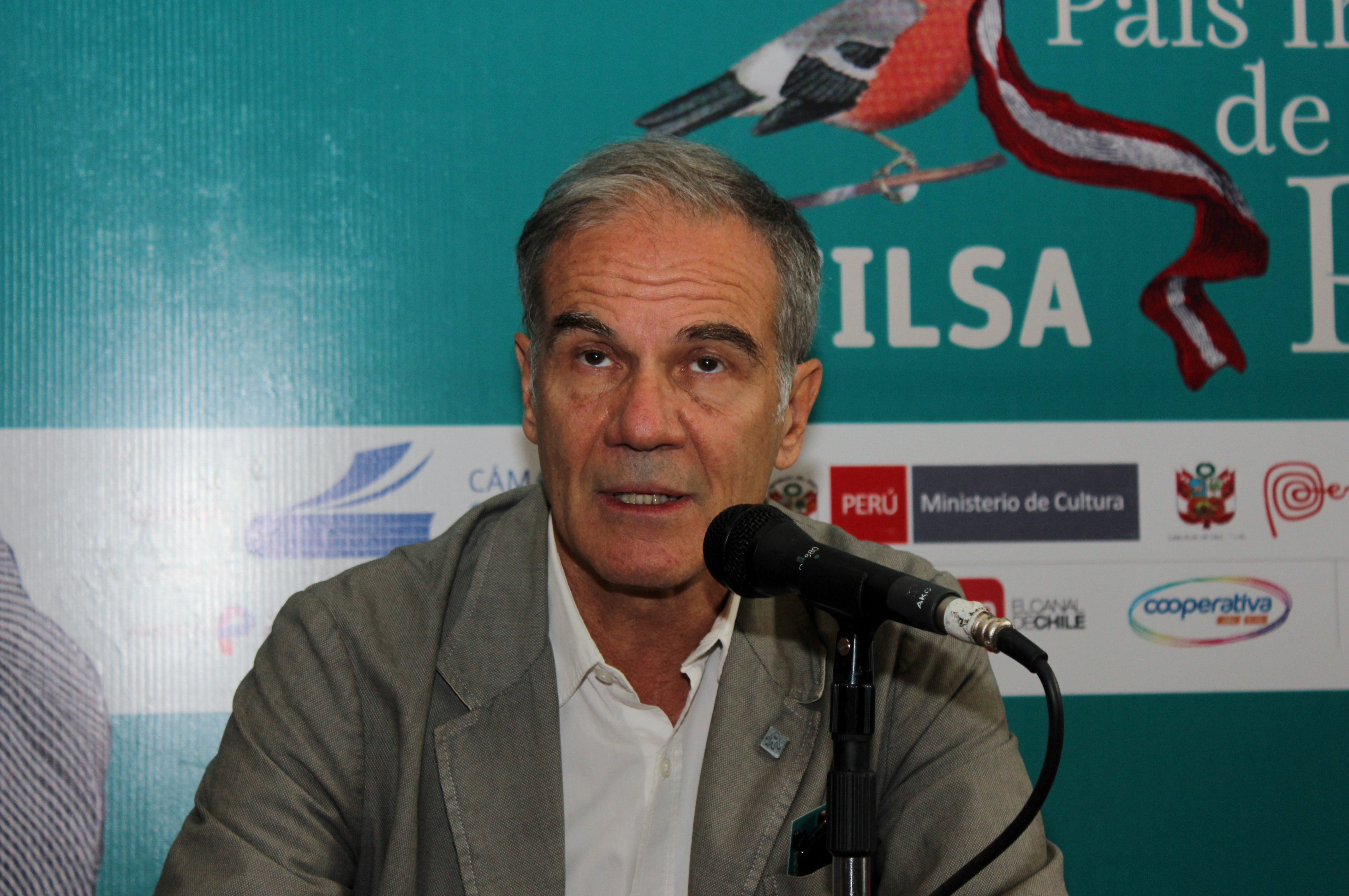 El escritor italiano Edoardo Albinati en la Feria Internacional del Libro de Santiago 2018.